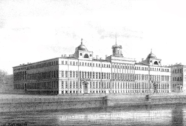 Здание Морского кадетского корпуса в Санкт-Петербурге в середине XIX века. Отсканировано с иллюстрации из книги 1852 года издания